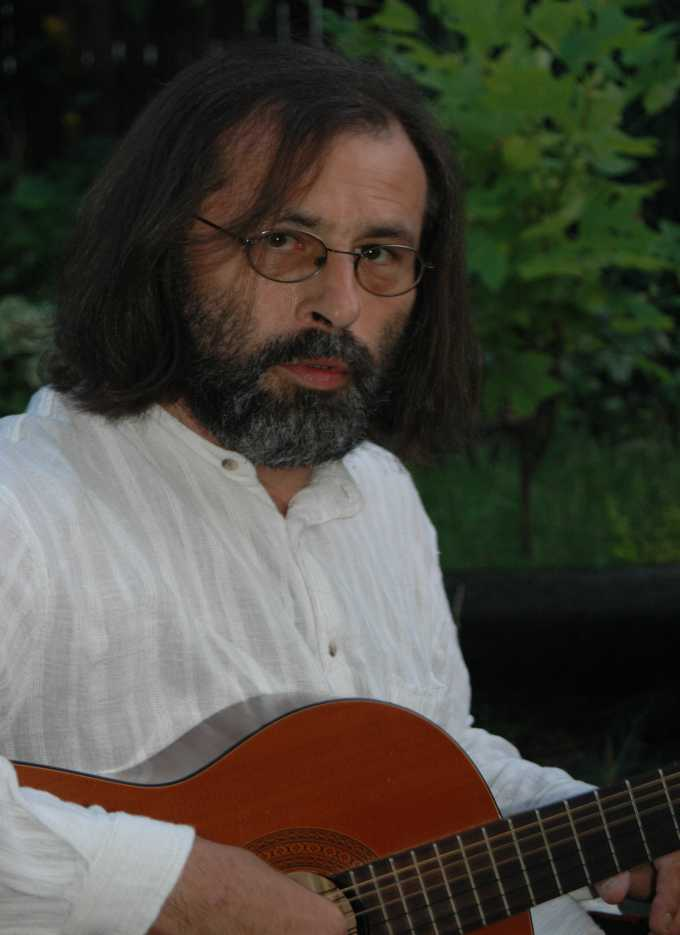 Zdjęcie portertowe przedstawiające barda Antoniego Murackiego